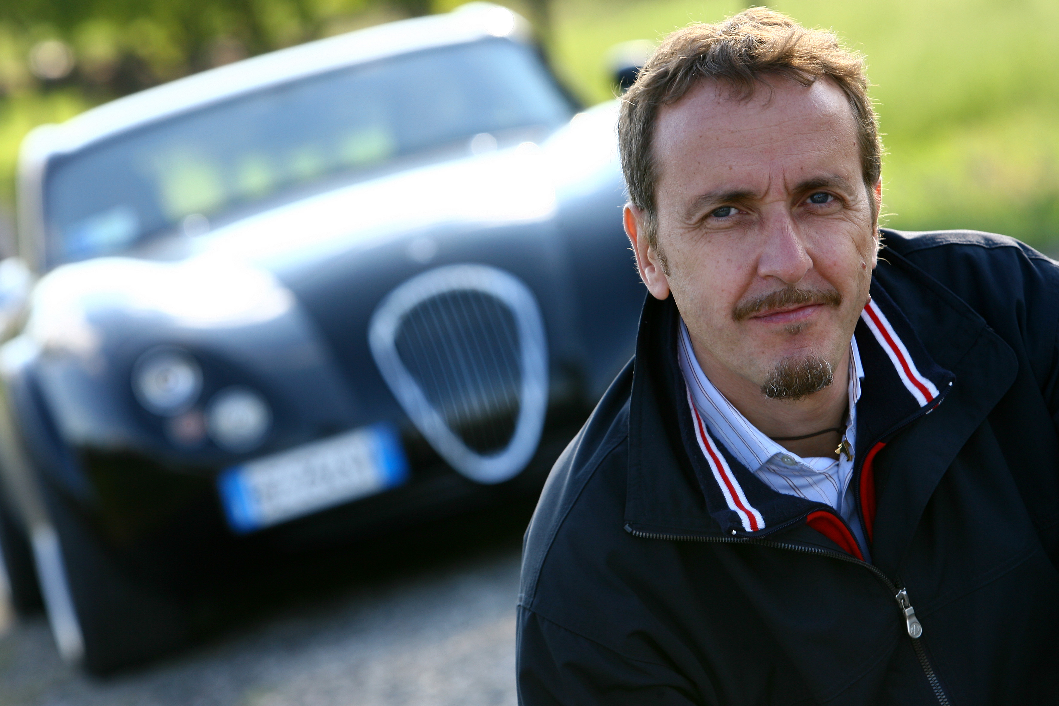 Dario Tonani